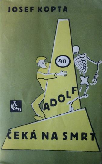 Tvorba Josefa Čapka - obálka knihy